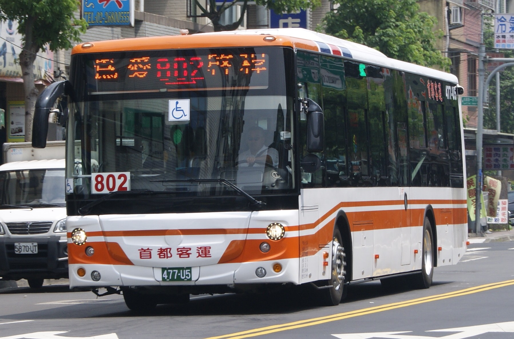 中文（台灣）: 首都客運2014年福田BJ6123柴油大客車477-U5，行駛新北市區公車802線。